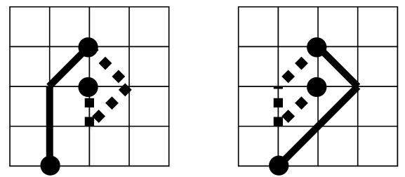 Два завала сразу после первого хода. Из издания "Мациевский С. В. Математическая культура. Игры: Учебное пособие. — Калининград: Изд-во Калининградского государственного университета, 2003. — 120 с., ил. — ISBN 5-88874-451-4. — Глава 4. Игры и головоломки. § 2. Футбол."